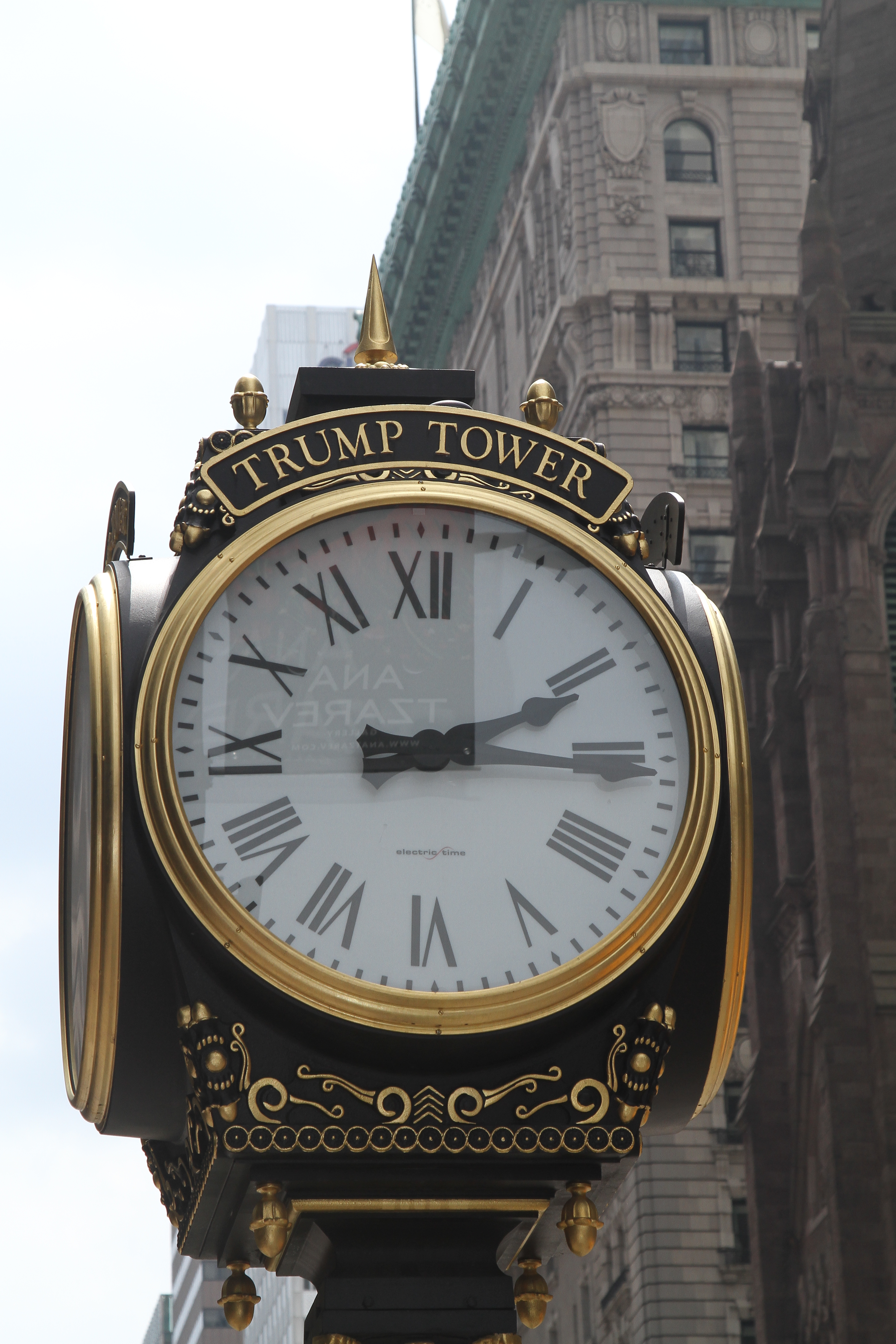 Klok voor de Trump Tower